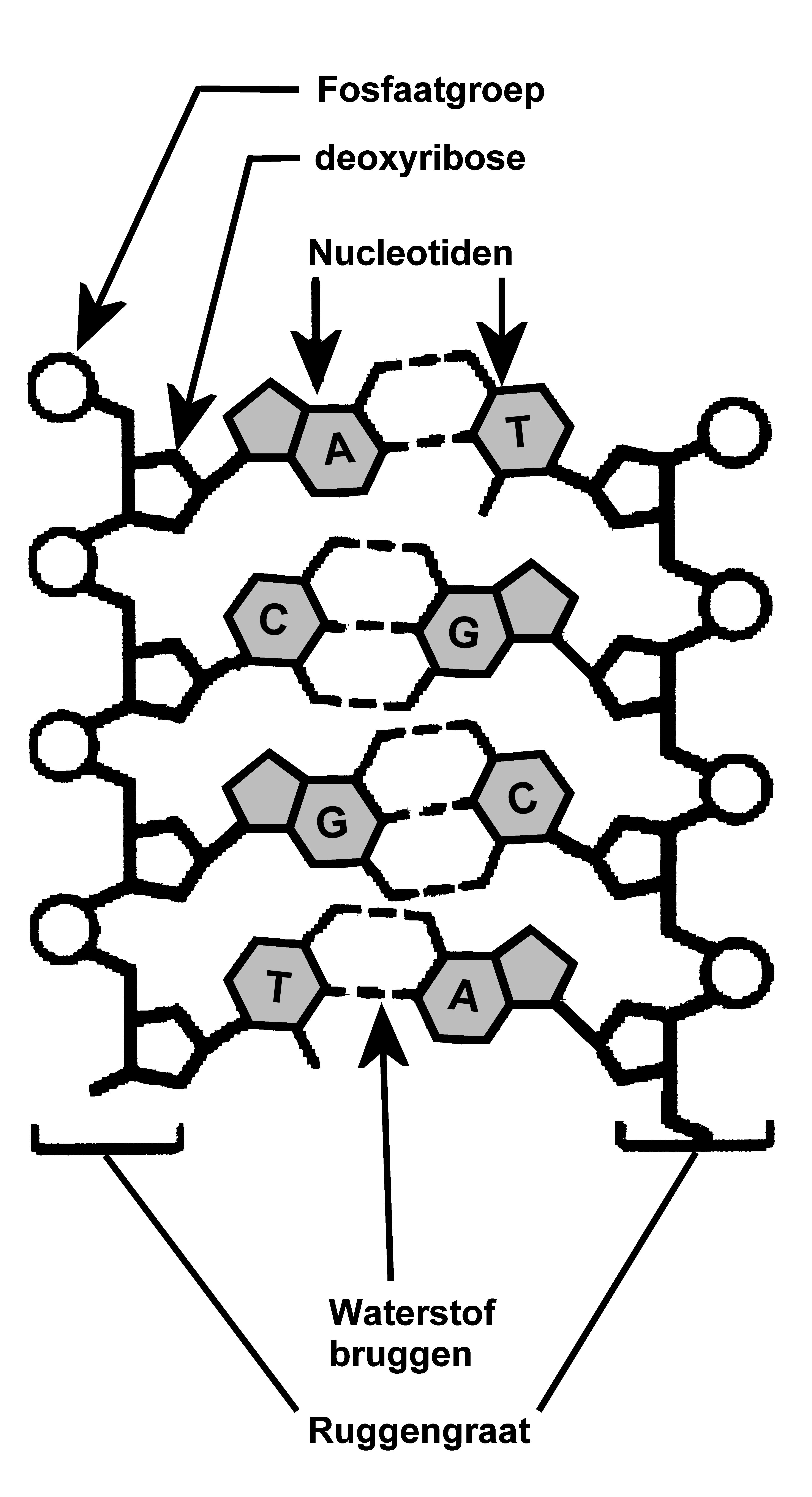 DNA structuur met nederlandse benaming